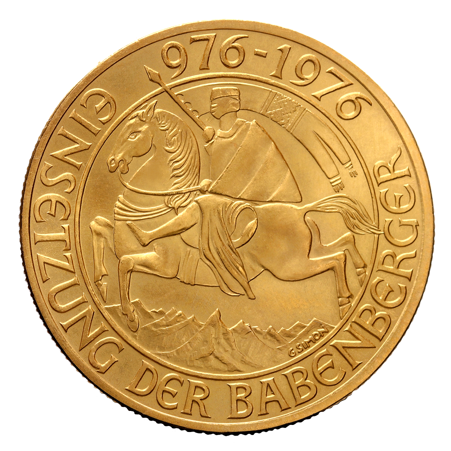 Das Bild zeigt die Bildseite der Babenberger Goldmünze.